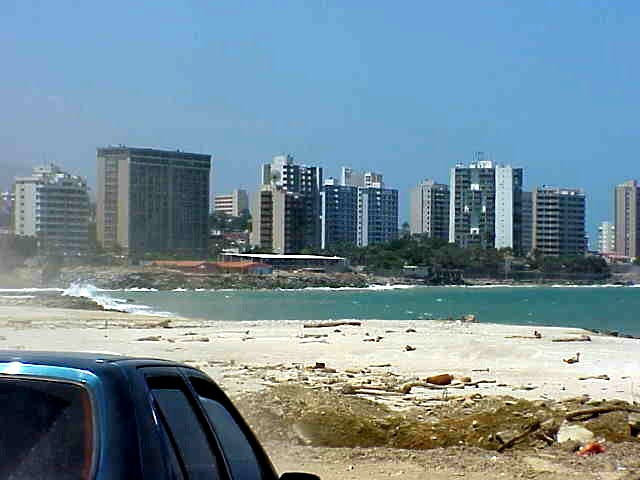 Macuto estado Vargas - Venezuela un mes despues de los deslaves de diciembre de 1999 (Enero 2000)